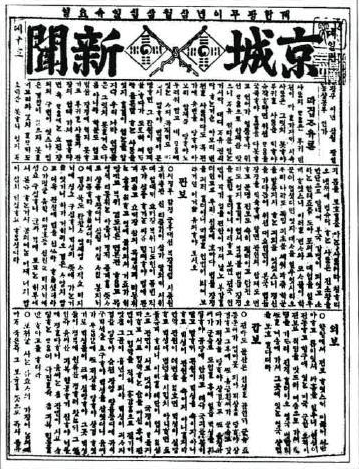 1899년 3월 30일자 경성신문, 윤치호와 윤치소가 공동으로 운영하였다.